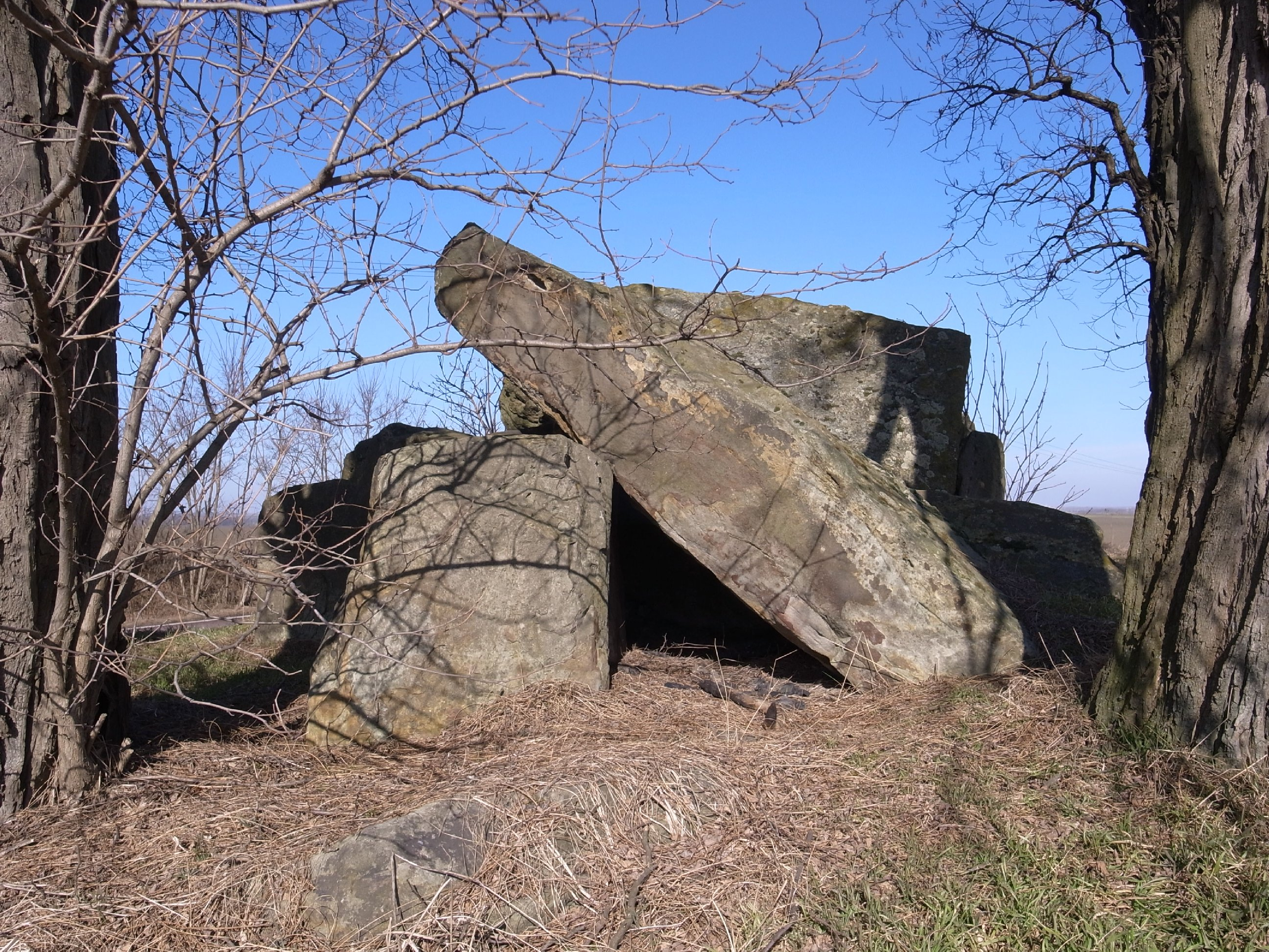 Großsteingrab Bierberg bei Gerbitz (Bernburg)